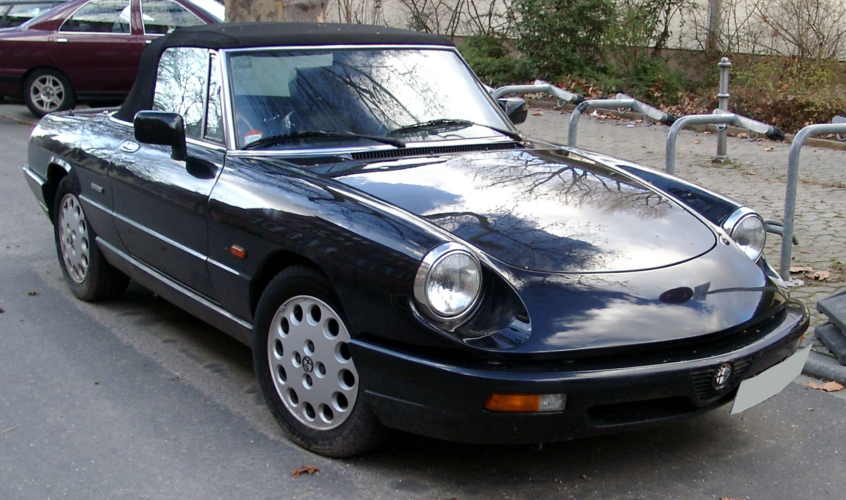 Alfa Romeo Spider